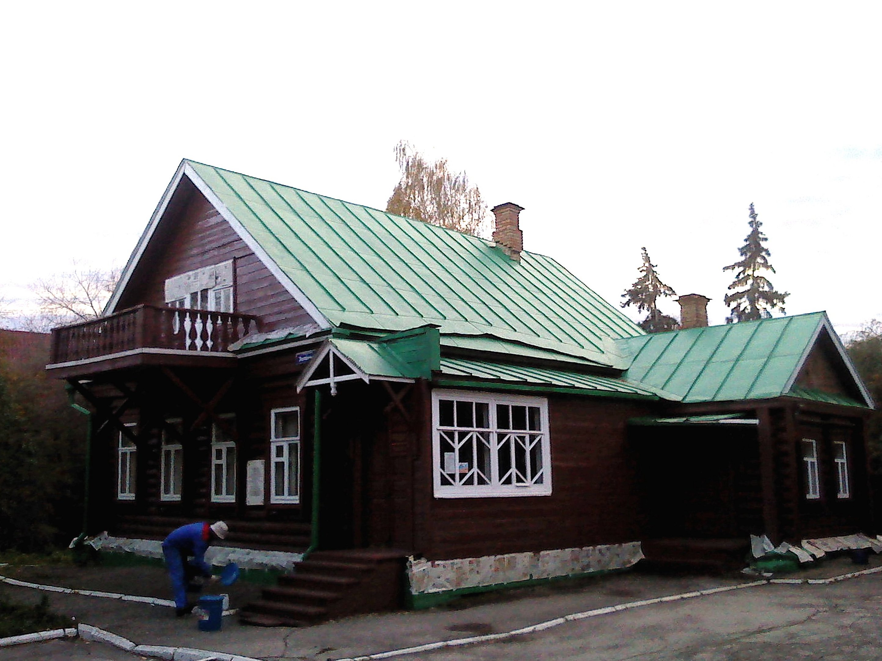 Идёт ремонт музея "Конспиративная квартира симбирской группы РСДРП", 3 октября 2012 г.